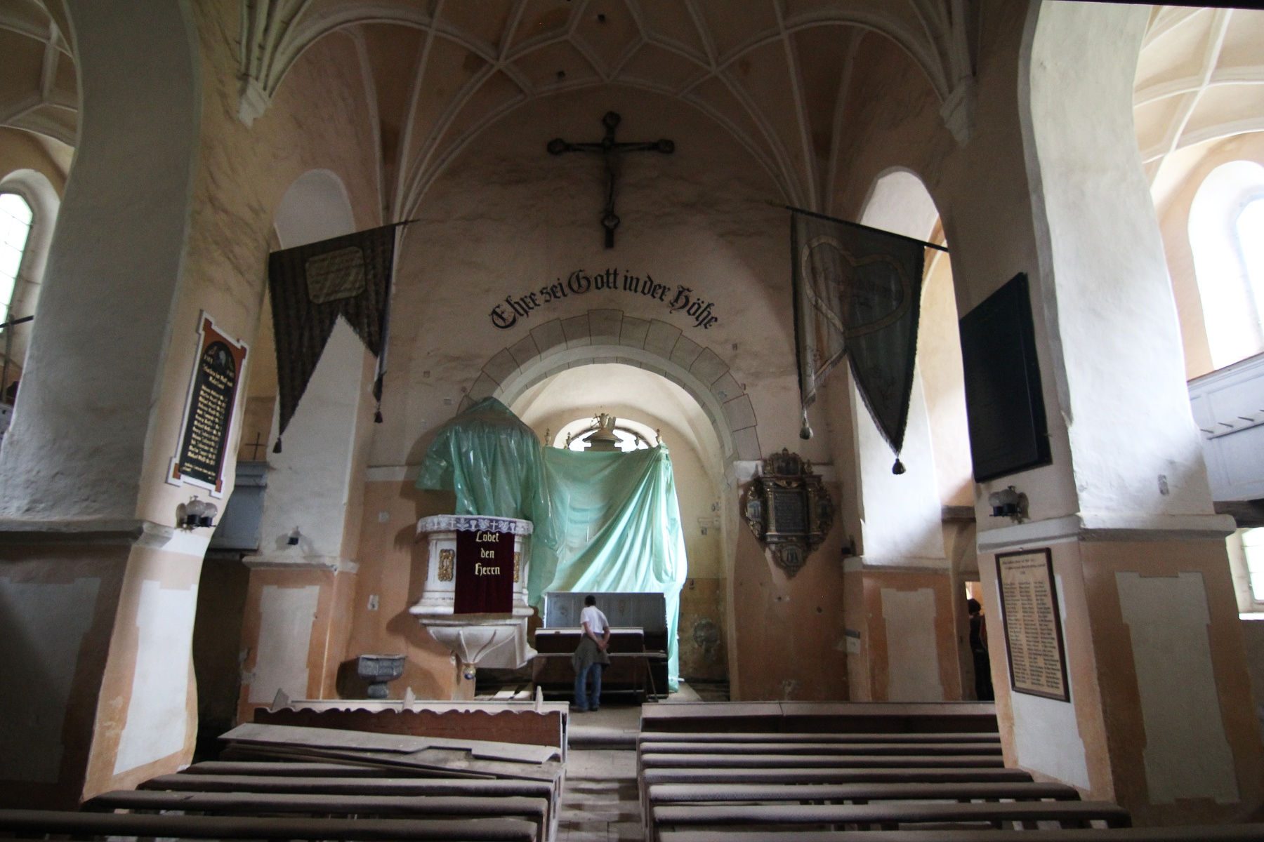 Dealu Frumos: Biserica evanghelică fortificată 01